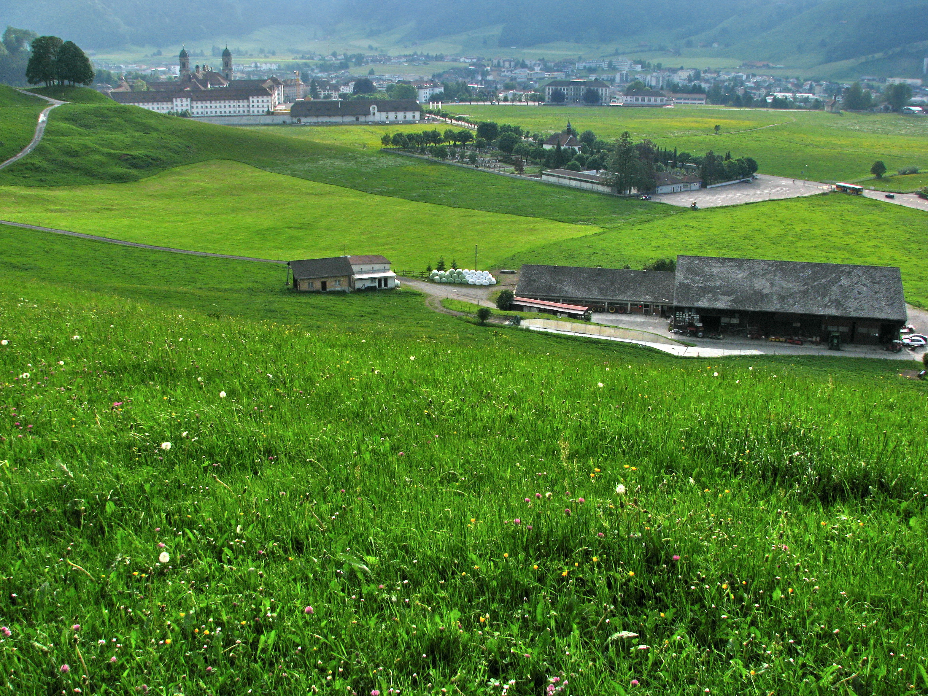 Einsiedeln (SZ) in Switzerland